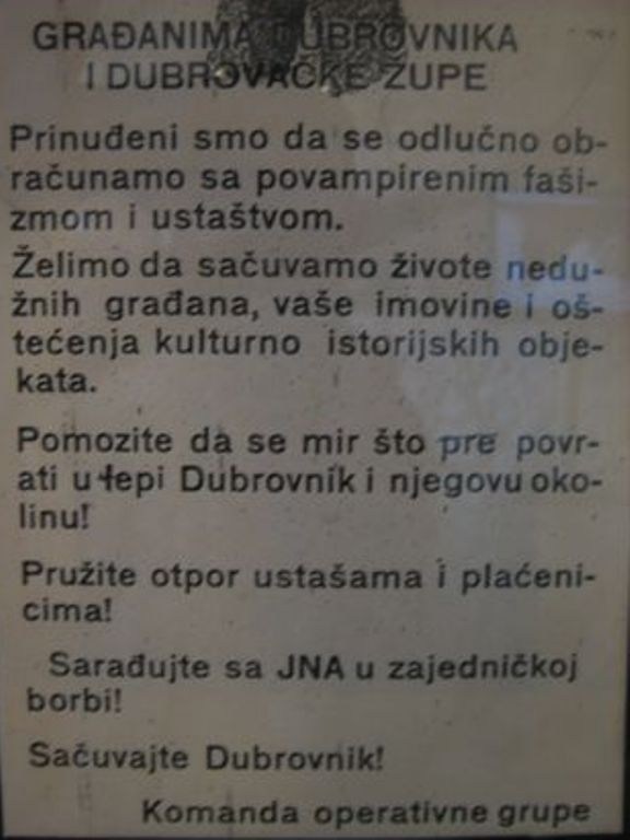 Letak JNA sa pozivom na pružanje otpora